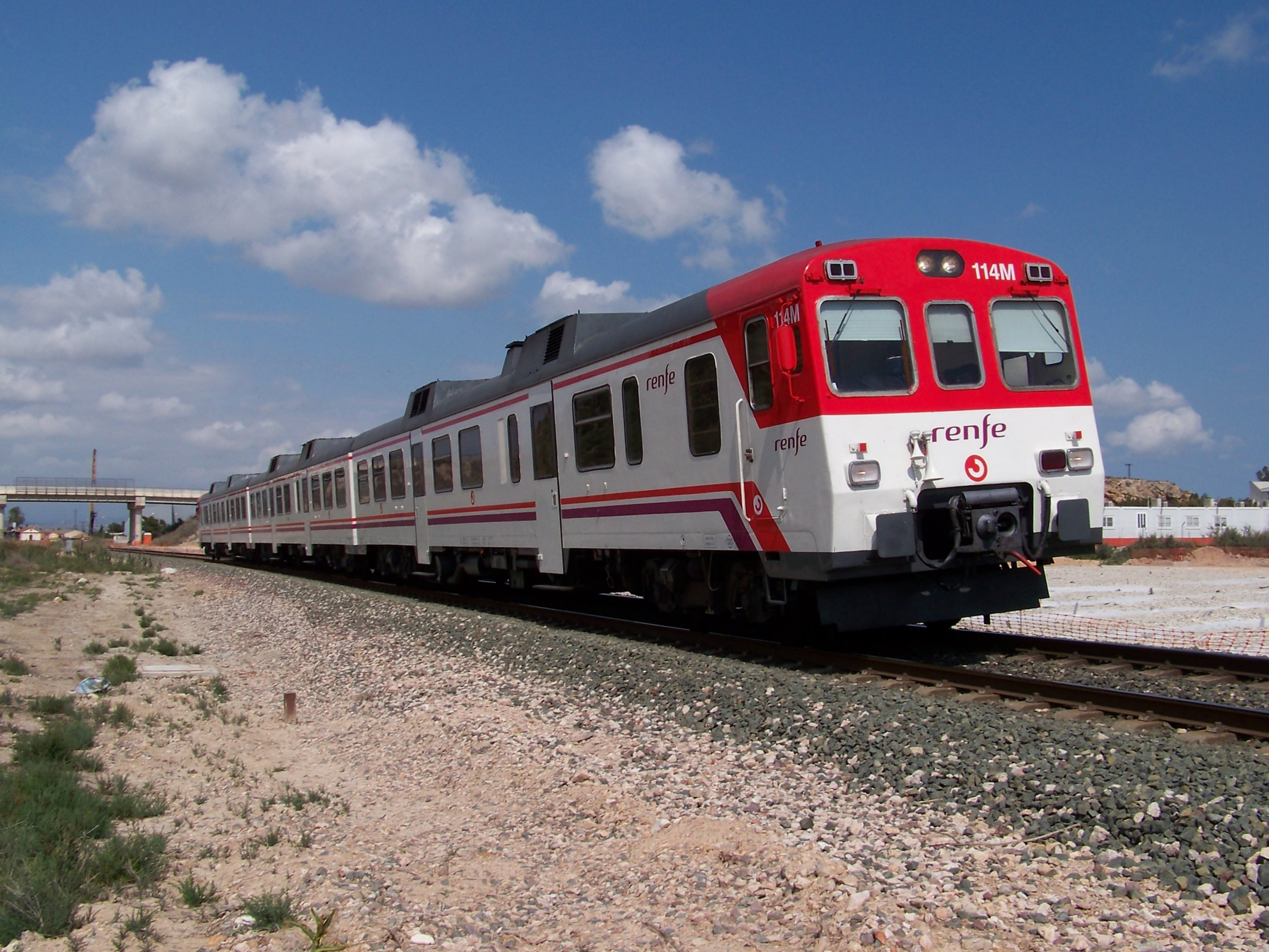 Triplete Camello Serie 592: 9-592-113-5 / 7-592-057-4 / 9-592-114-3 , Cercanías C1 Alicante-Murcia de la 15.50h - circa Estación RENFE Albatera-Catral, Provincia de Alicante (España).